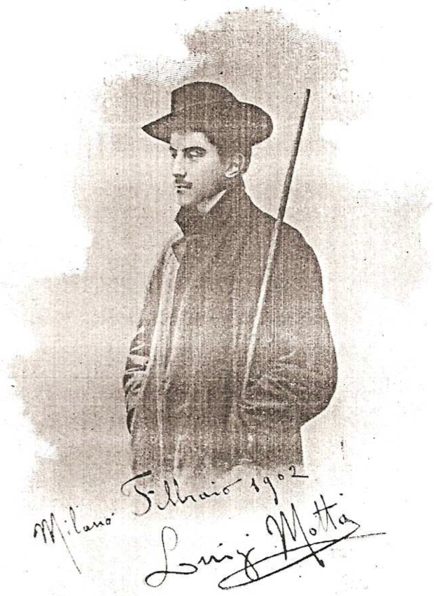 Immagine di Luigi Motta autografata, Milano febbraio 1902; tratta dal romanzo Il Sahara di ghiaccio, Bemporad 1904.